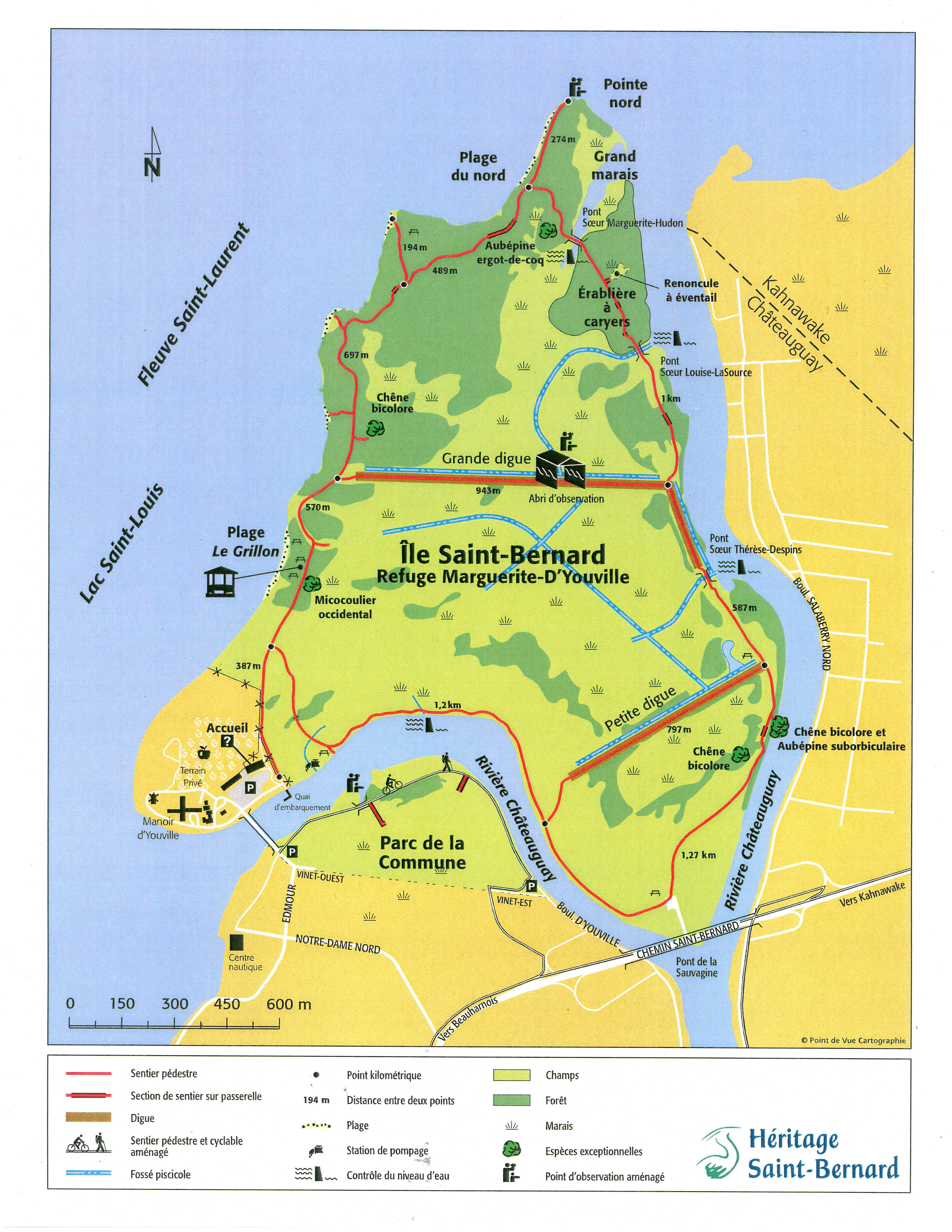 Plan des sentiers de l'île Saint-Bernard.